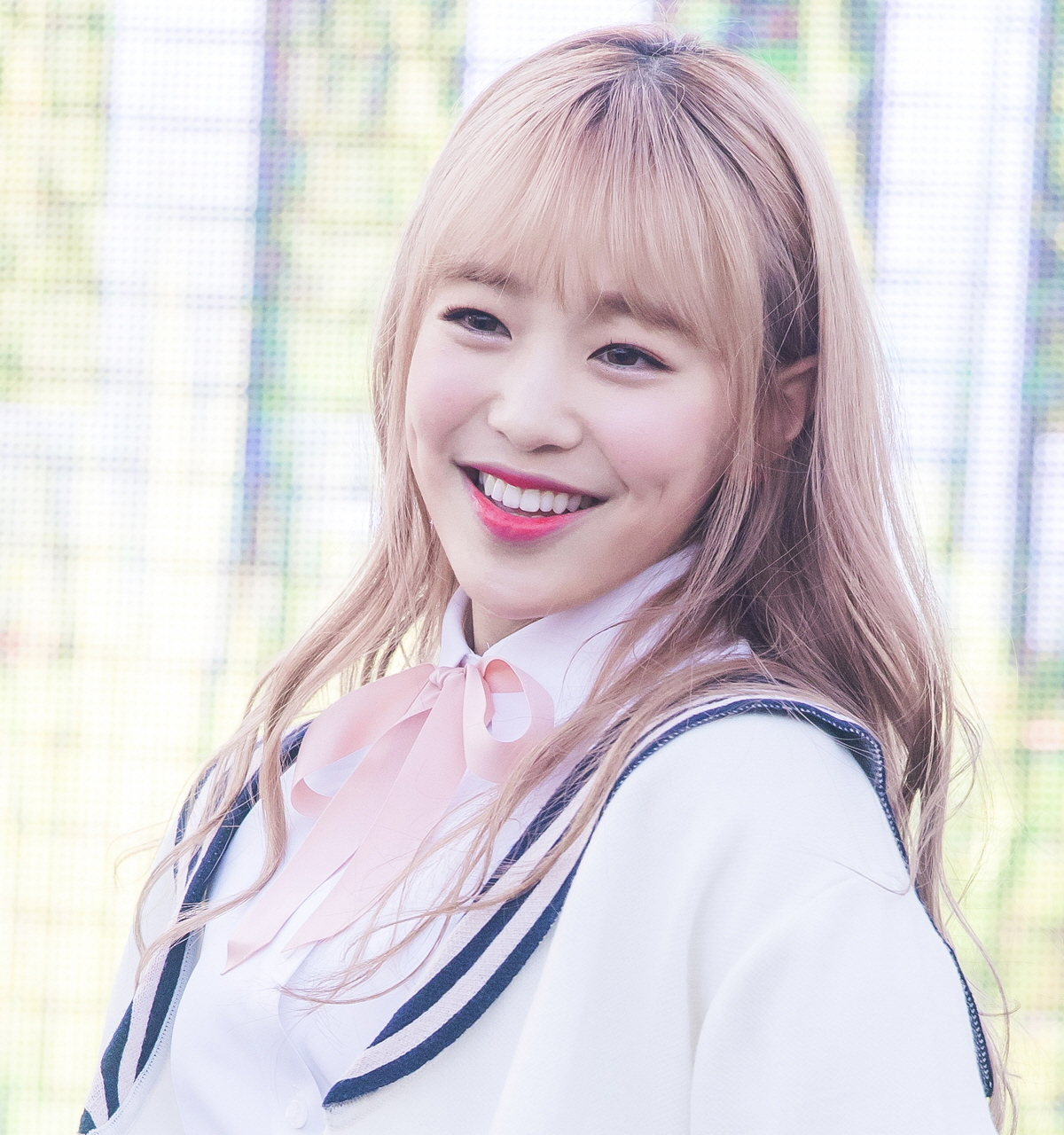 171105 오산 청소년축제 에이프릴